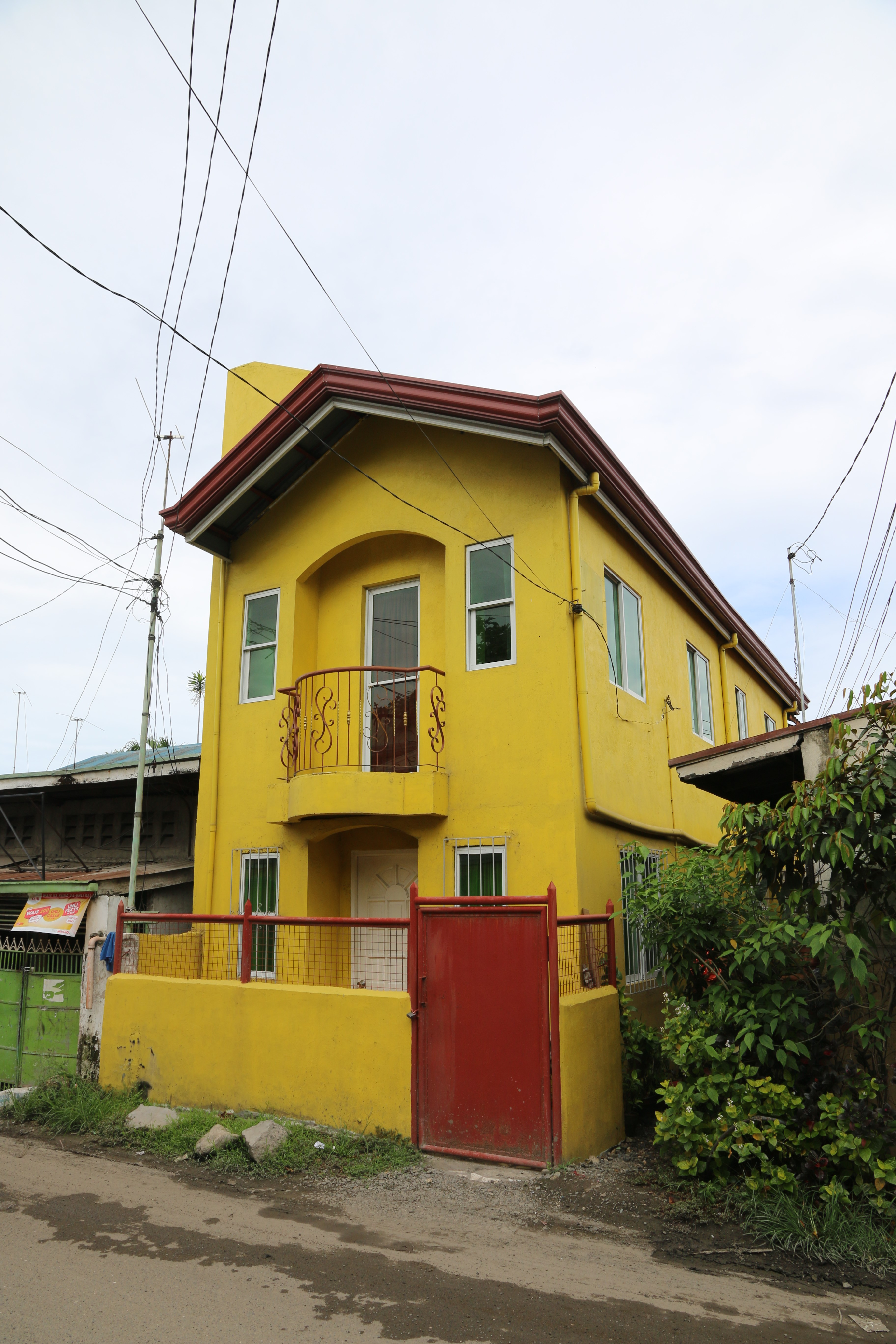 Beautiful yellow house talisay cebu